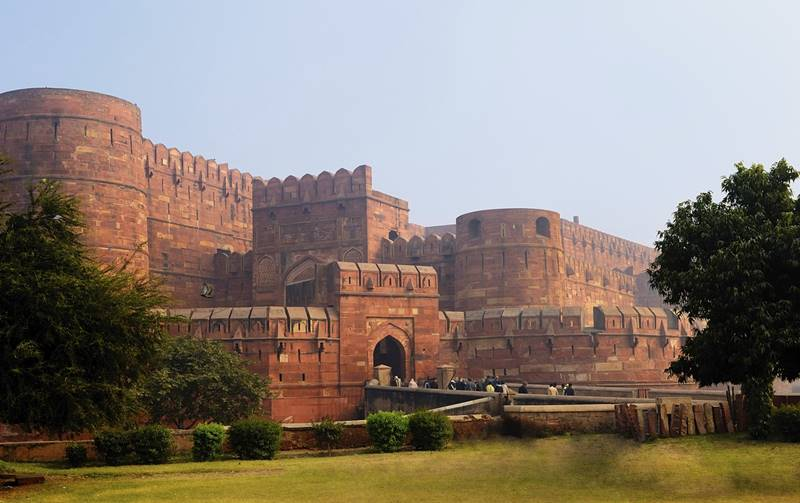 Qırmızı Qala